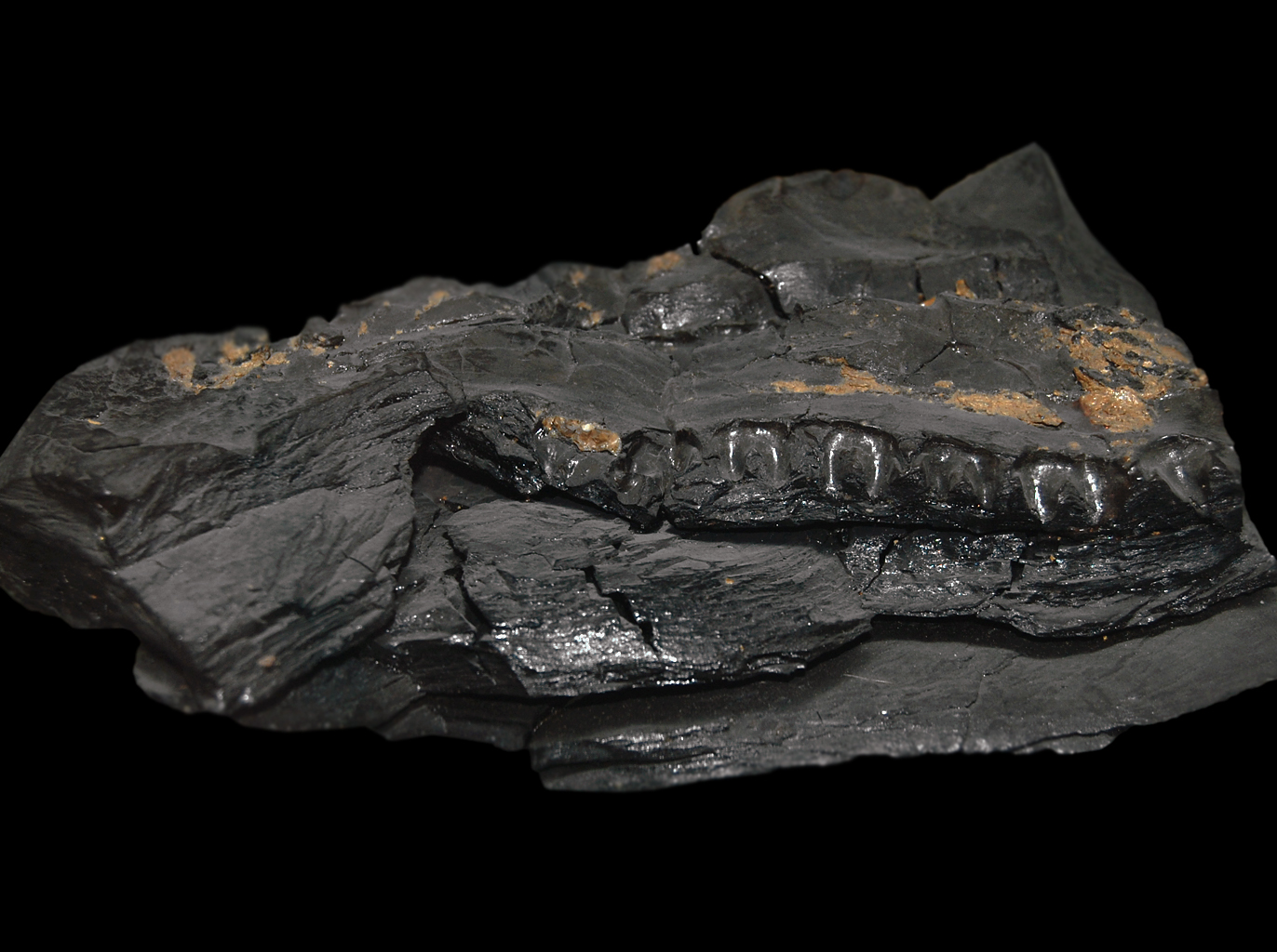 Babes Bolyai paleontology museum